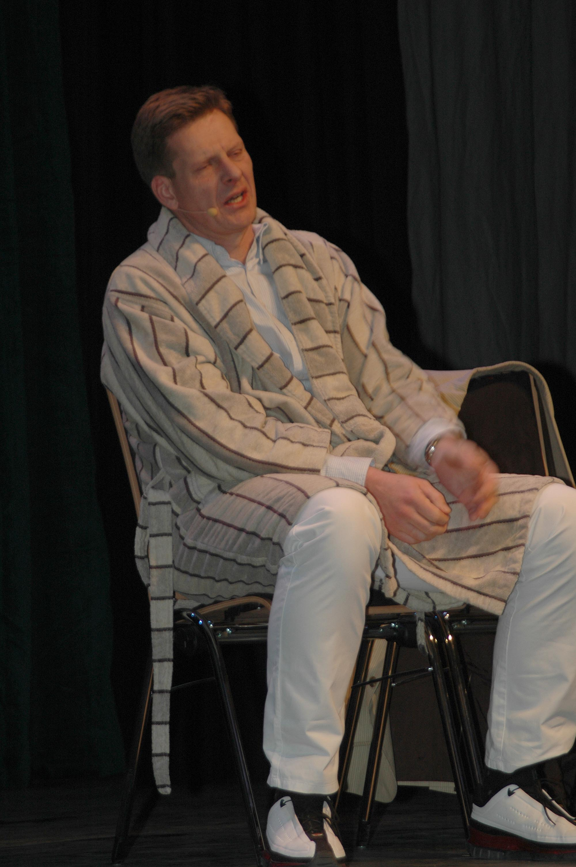 Lüder Wohlenberg bei seinem Auftritt auf der Freiburger Kulturbörse 2009